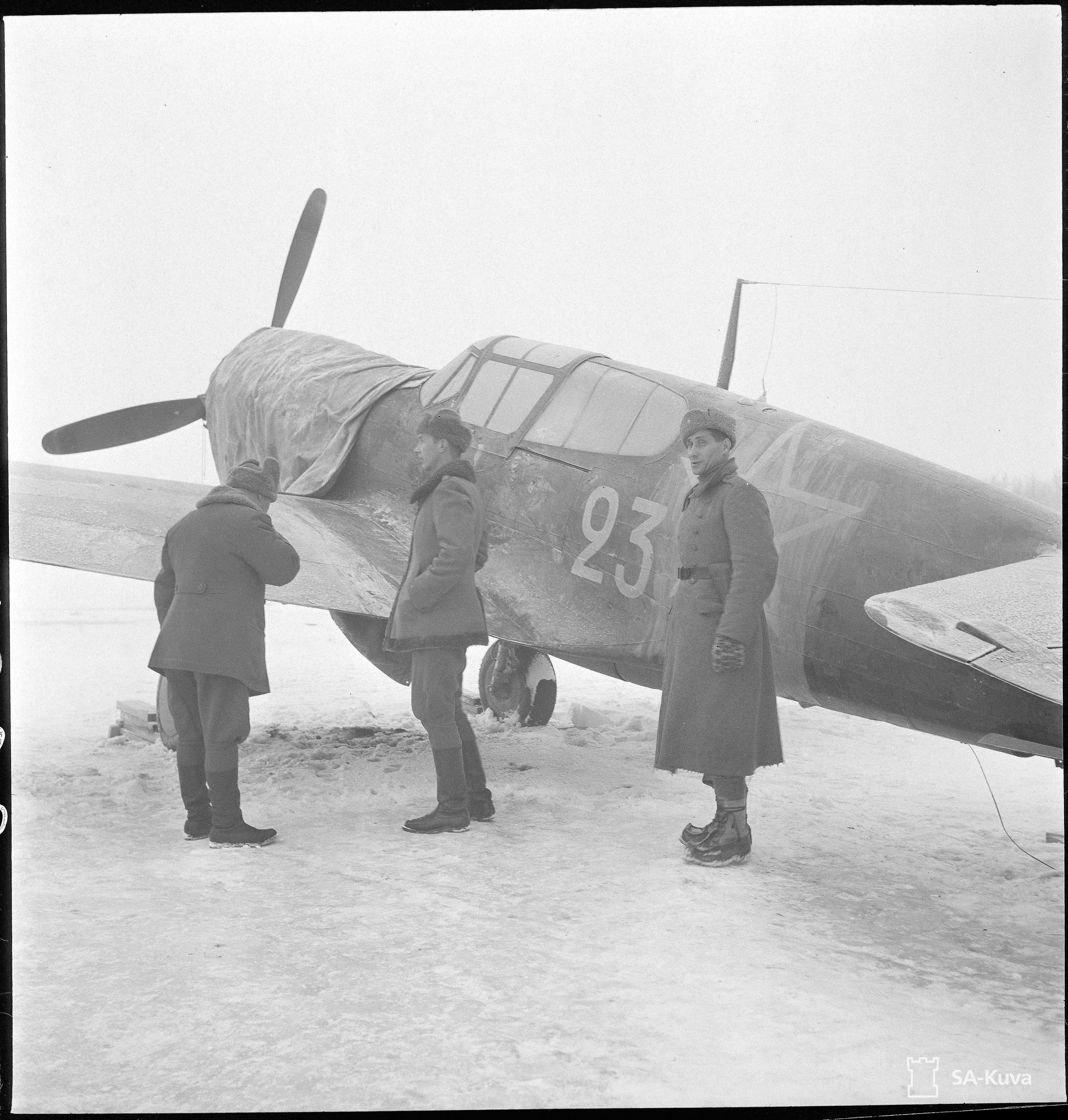 Kuvia pakkolaskun tehneestä venäläiasestä koneesta. (Kuvassa on on Curtiss P-40 M-10 (Kittyhawk)). Kuvauspaikka: Valkjärvi